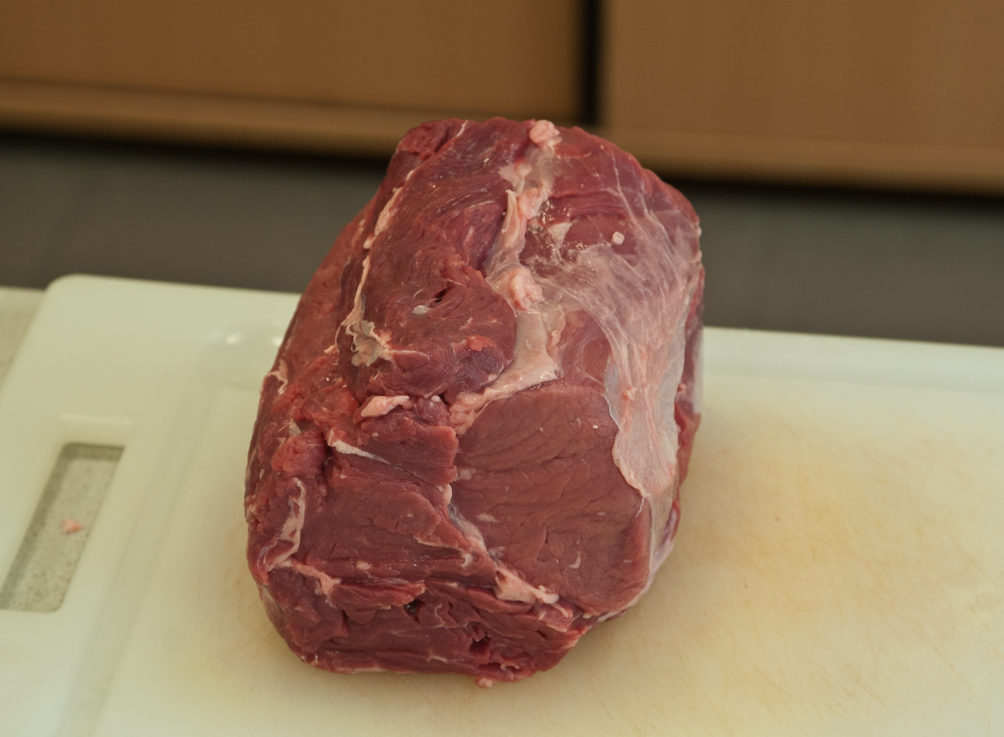 Bratenstück vom Rind für Mostbraten Essen und Trinken aus Österreich in der Wikipedia 30. August bis 1. September 2013 in Wien Beim Kochtreffen in Wien wurde gemeinsam Gemüse geputzt, Essen zubereitet, einzelne Bearbeitungsschritte fotografisch dokumentiert, Zubereitungsarten gefilmt und auch ein wenig gegessen. The making of this work was supported by Wikimedia Austria. For other files made with the support of Wikimedia Austria, please see the category Supported by Wikimedia Österreich. The making of this document was supported by the Community-Budget of Wikimedia Germany.